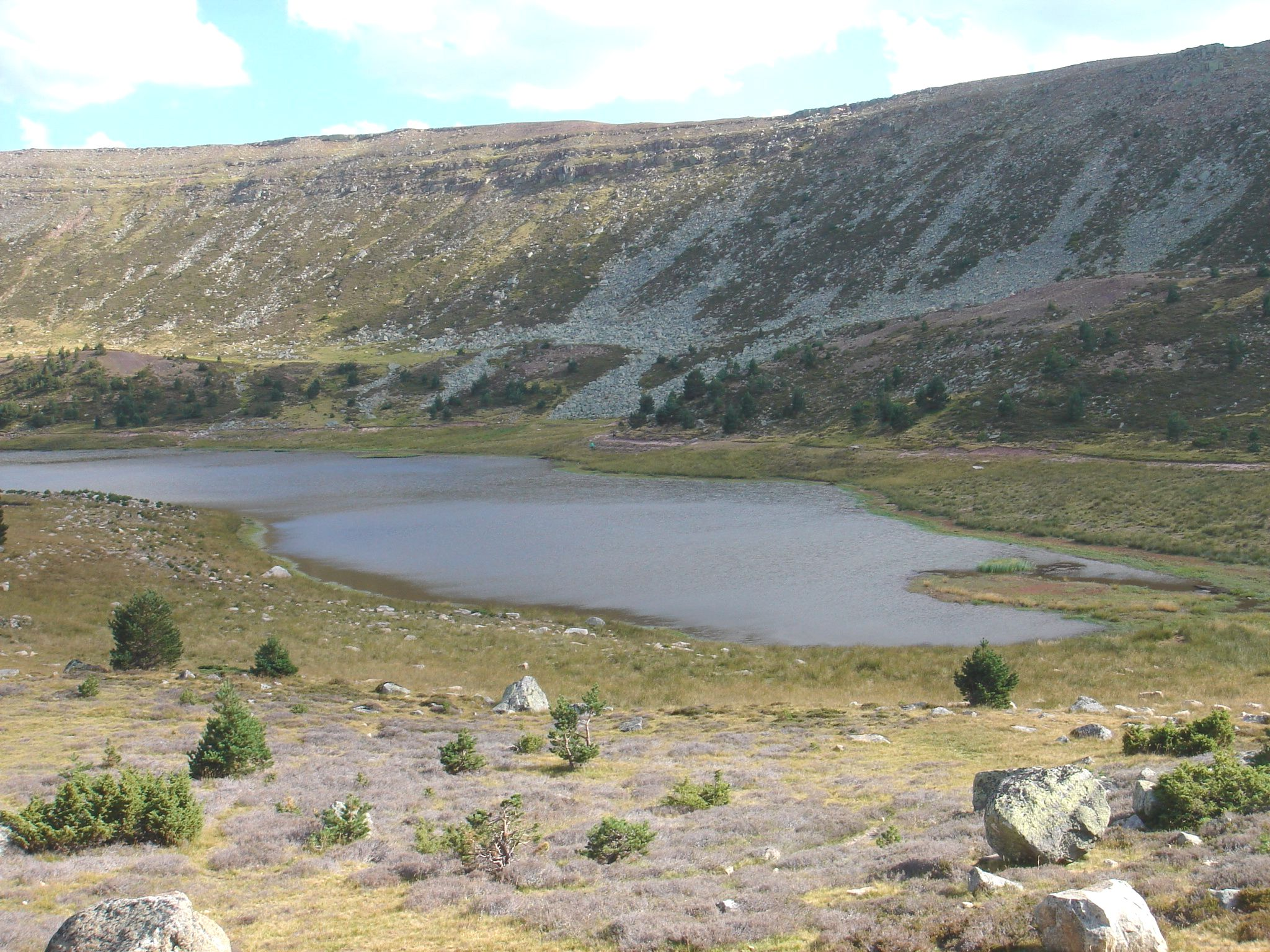 Lagoon of Neila (Neila, Burgos)